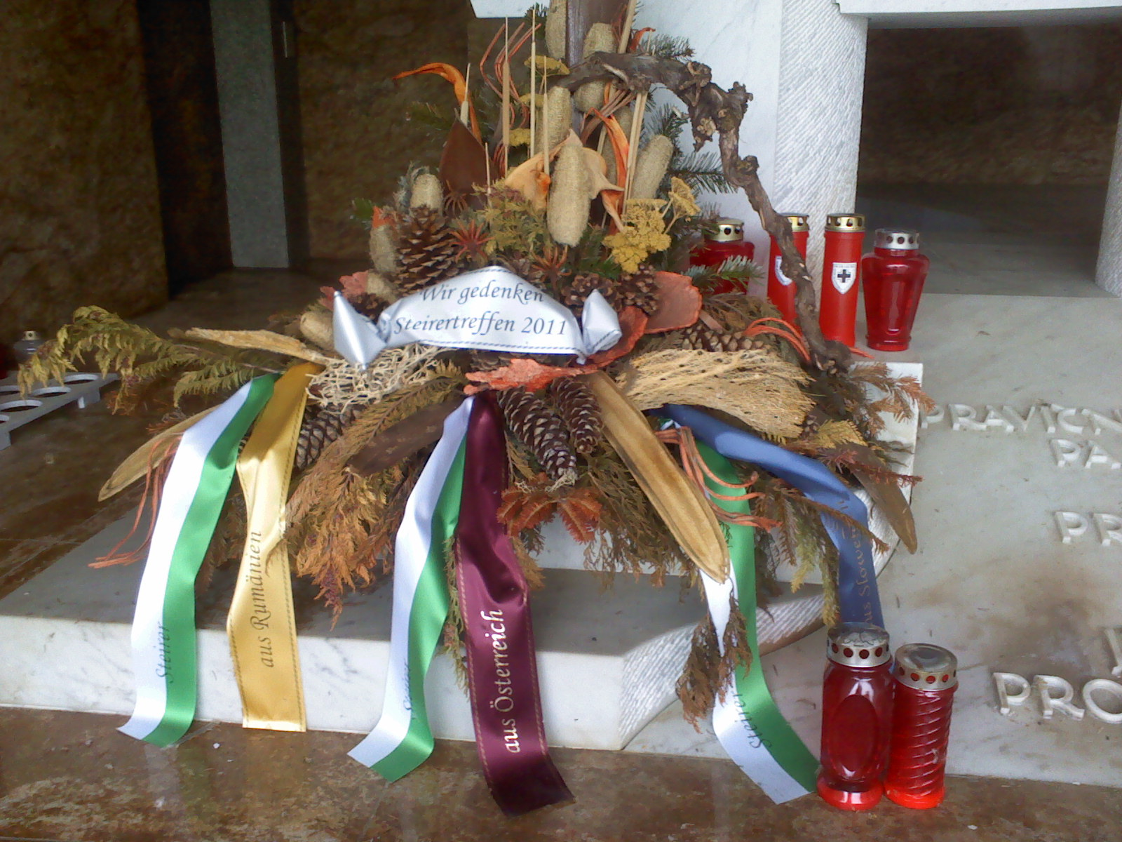 Venci pod spomenikom v spominskem parku Teharje, v bivšem taborišču na Teharjah